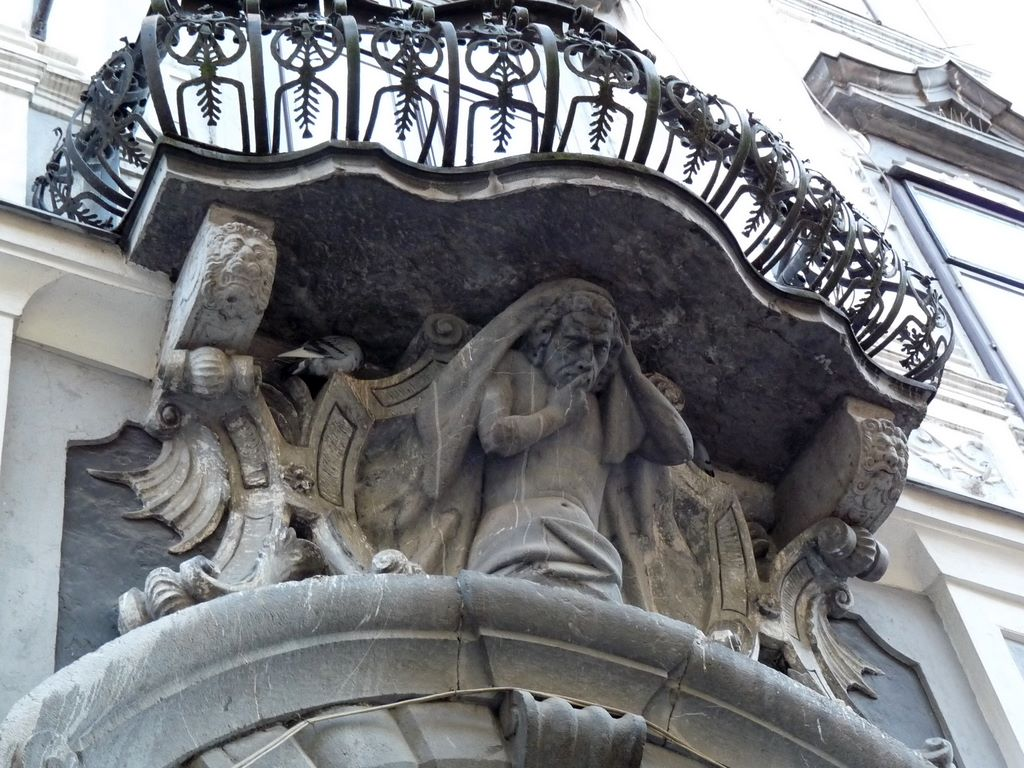 Portal Schweigerjeve hiše